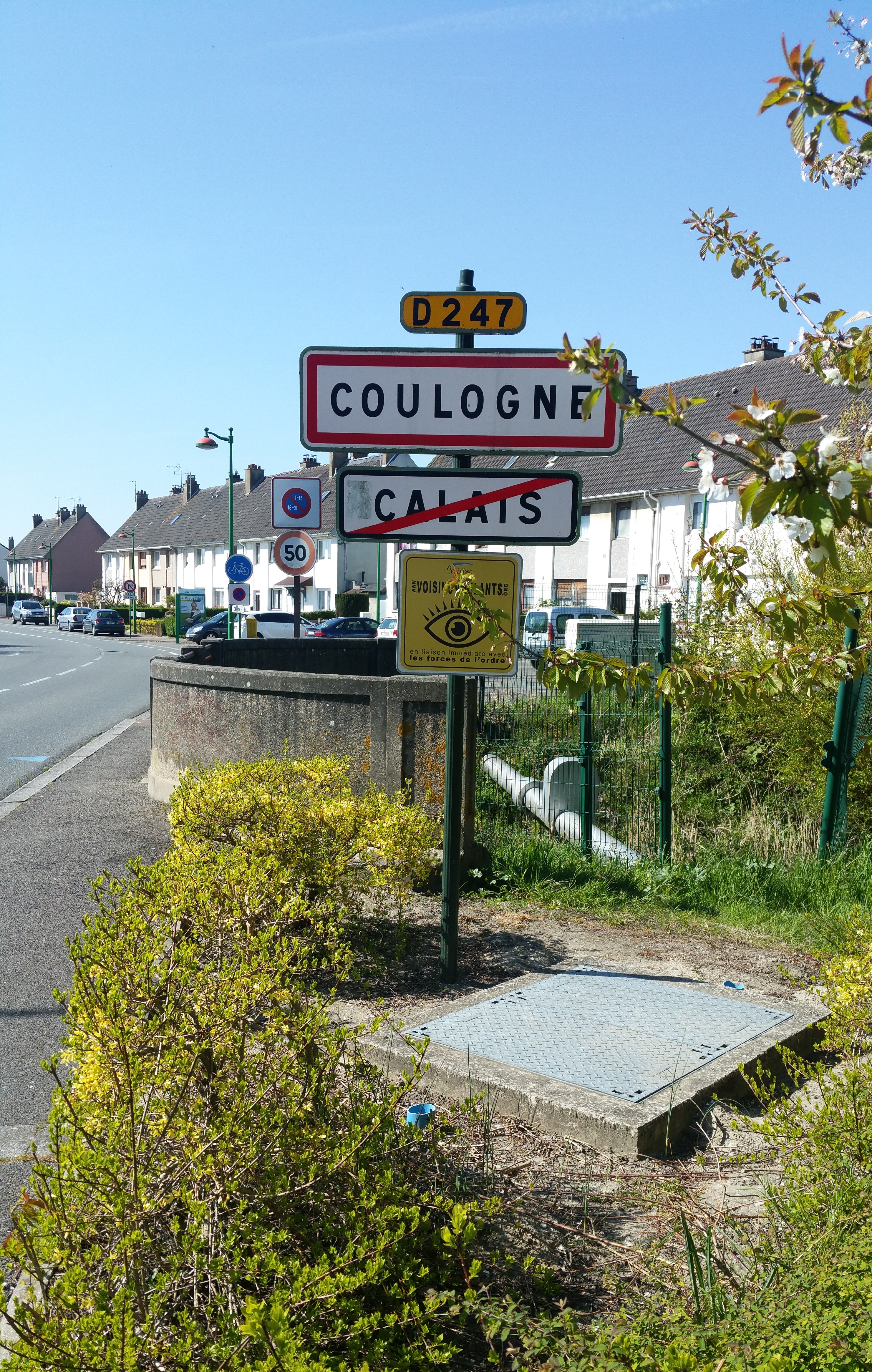 Vue d'une entrée de Coulogne en sortie de Calais.